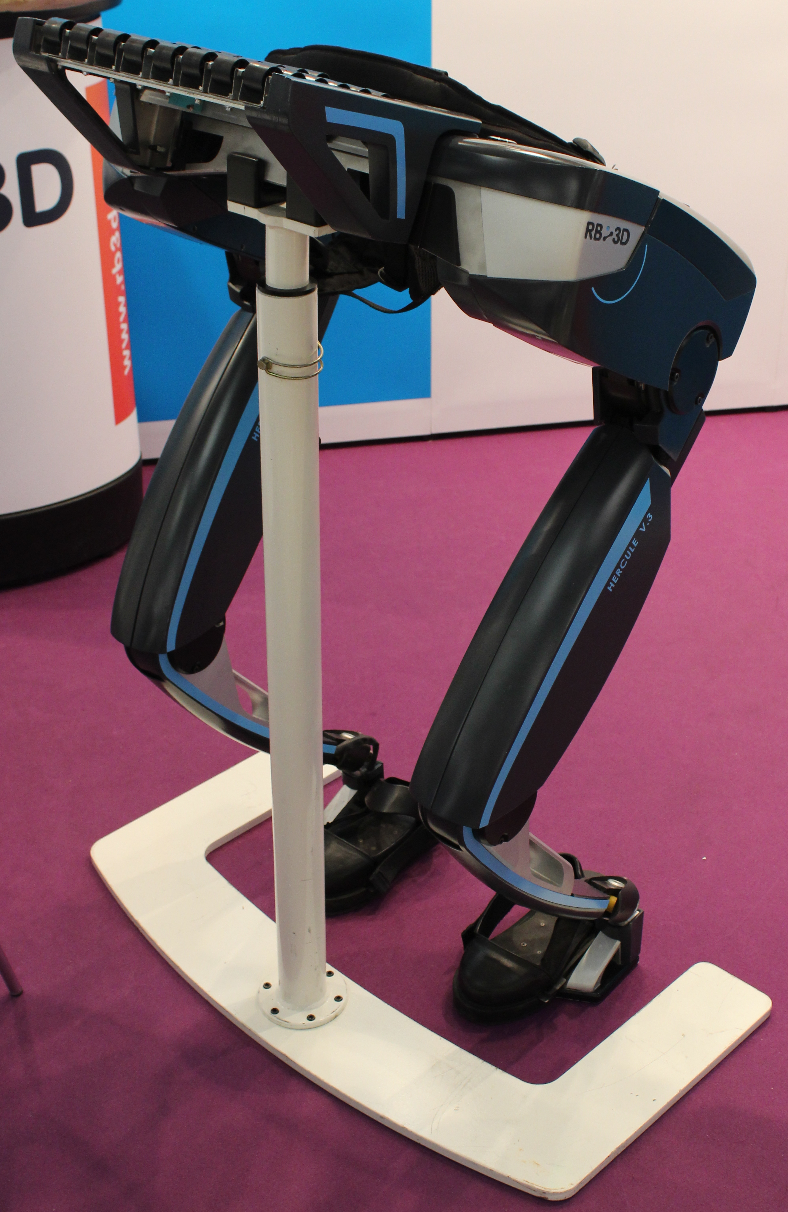 L'exosquelette Hercule de l'entreprise RB3D au salon Innorobo à Lyon en 2015.